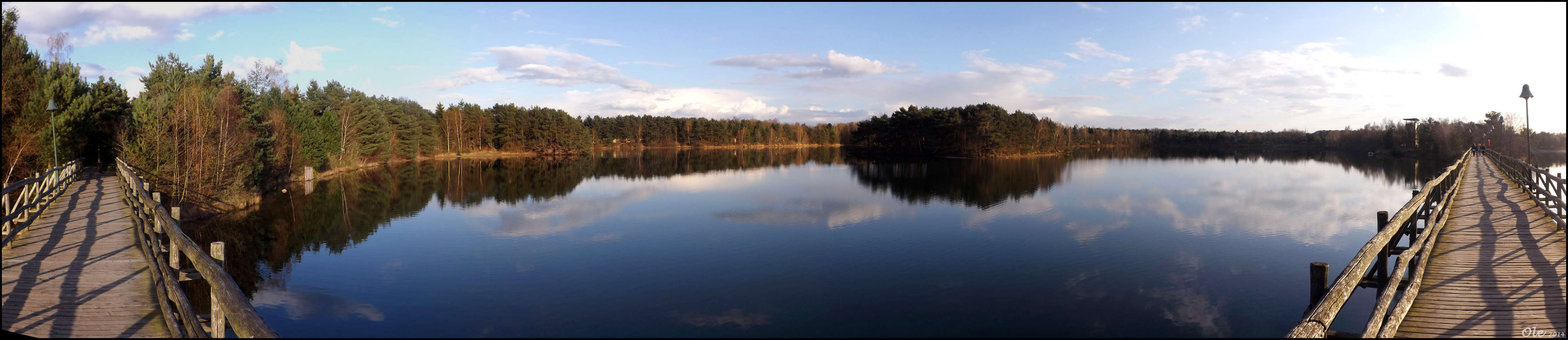 Brückenpanorama [Center Parcs De Vossemeren 2014/03]